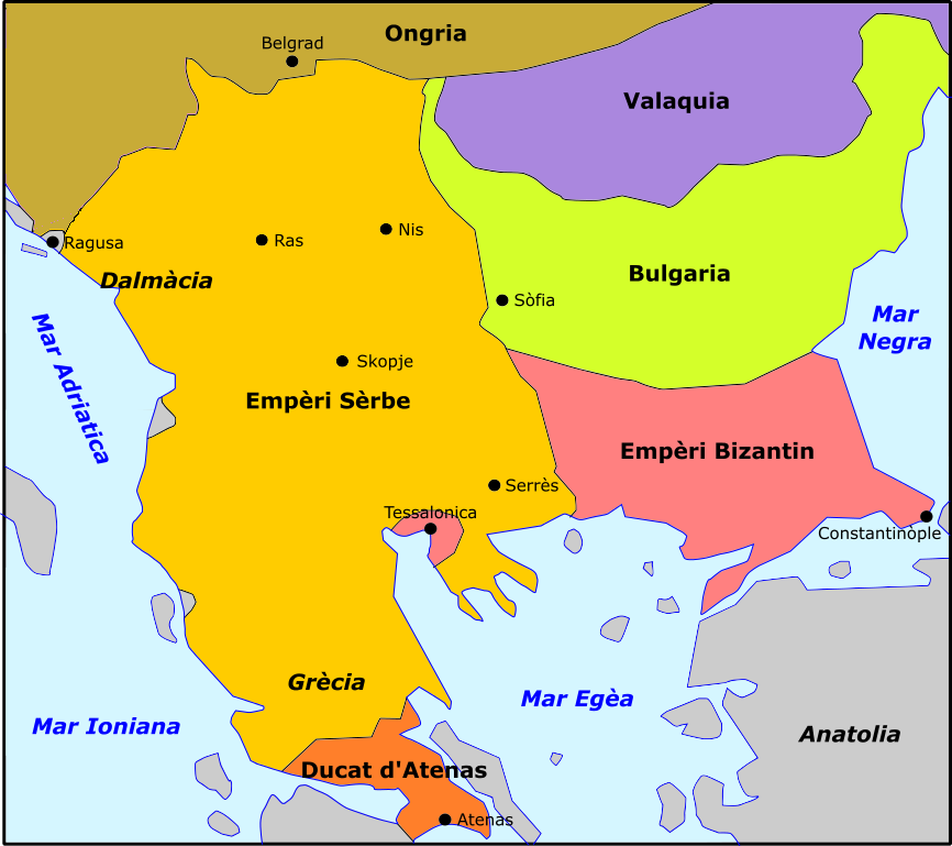 Extension de l'Empèri Sèrbe a la mòrt de Stefan Dusan.